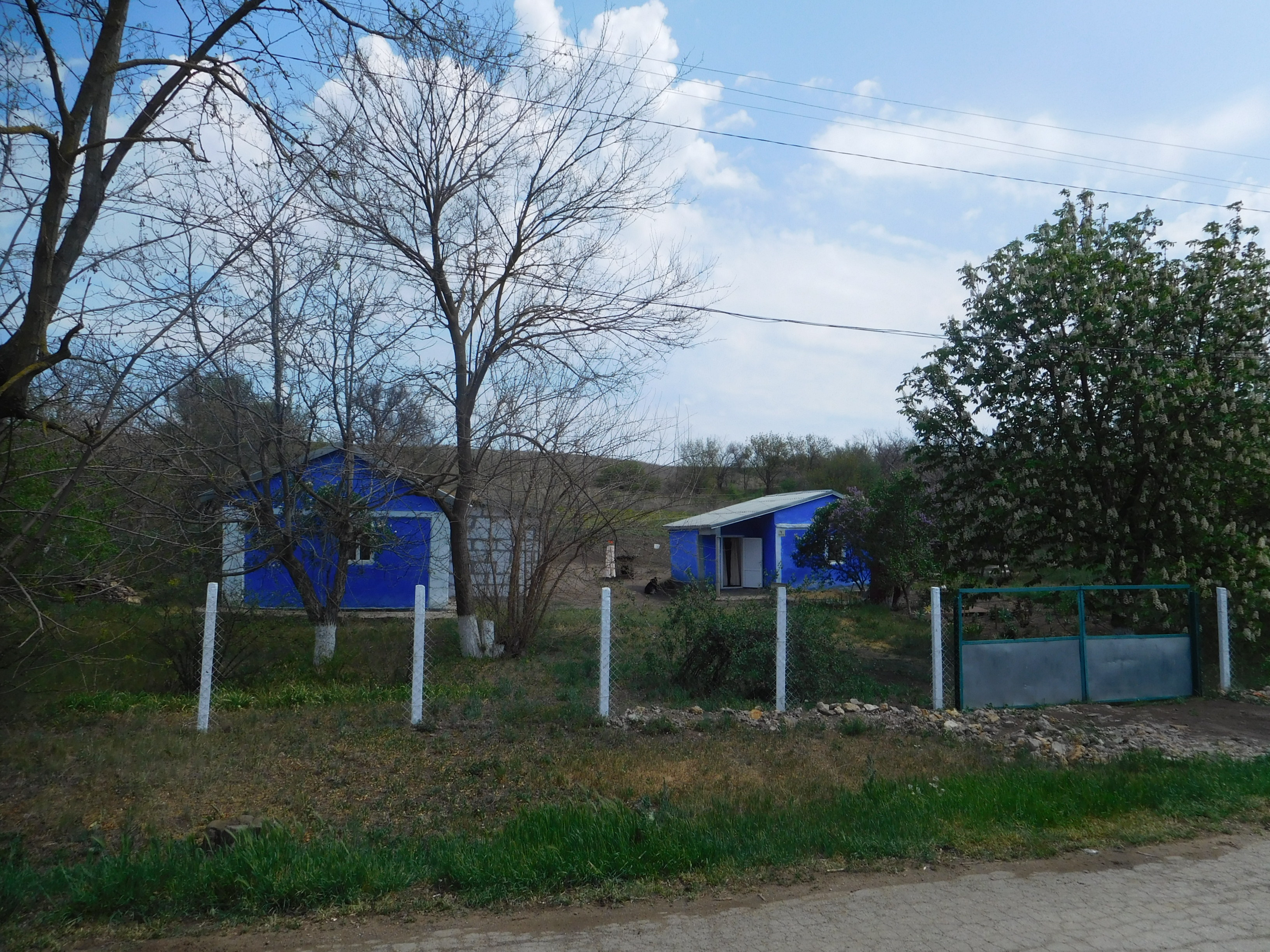 с. Бузинове, Іванівський район, Одеська область